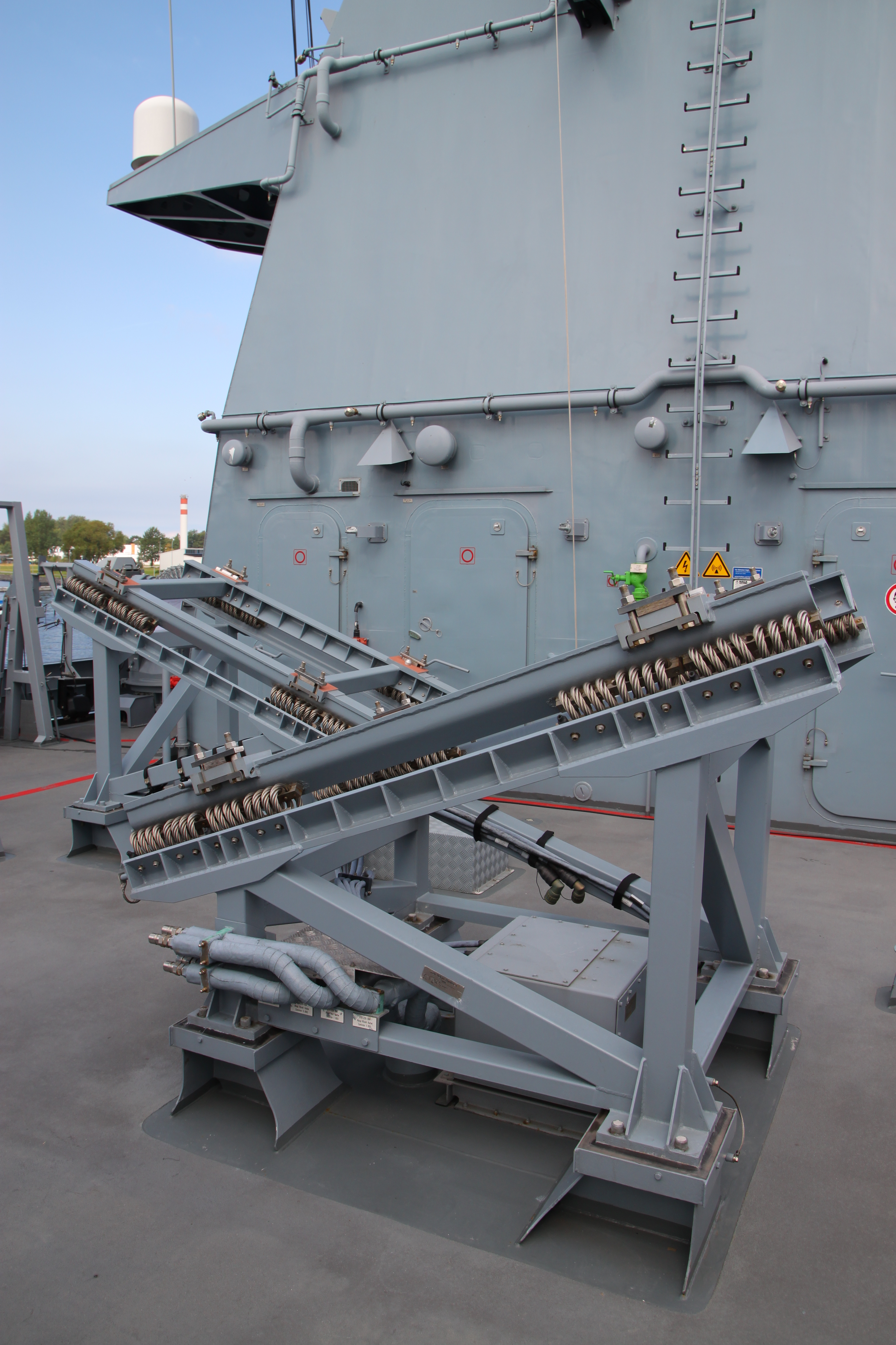 RBS 15 Mk3 - Seezielflugkörper - Abschussrampe Hanse Sail 2011